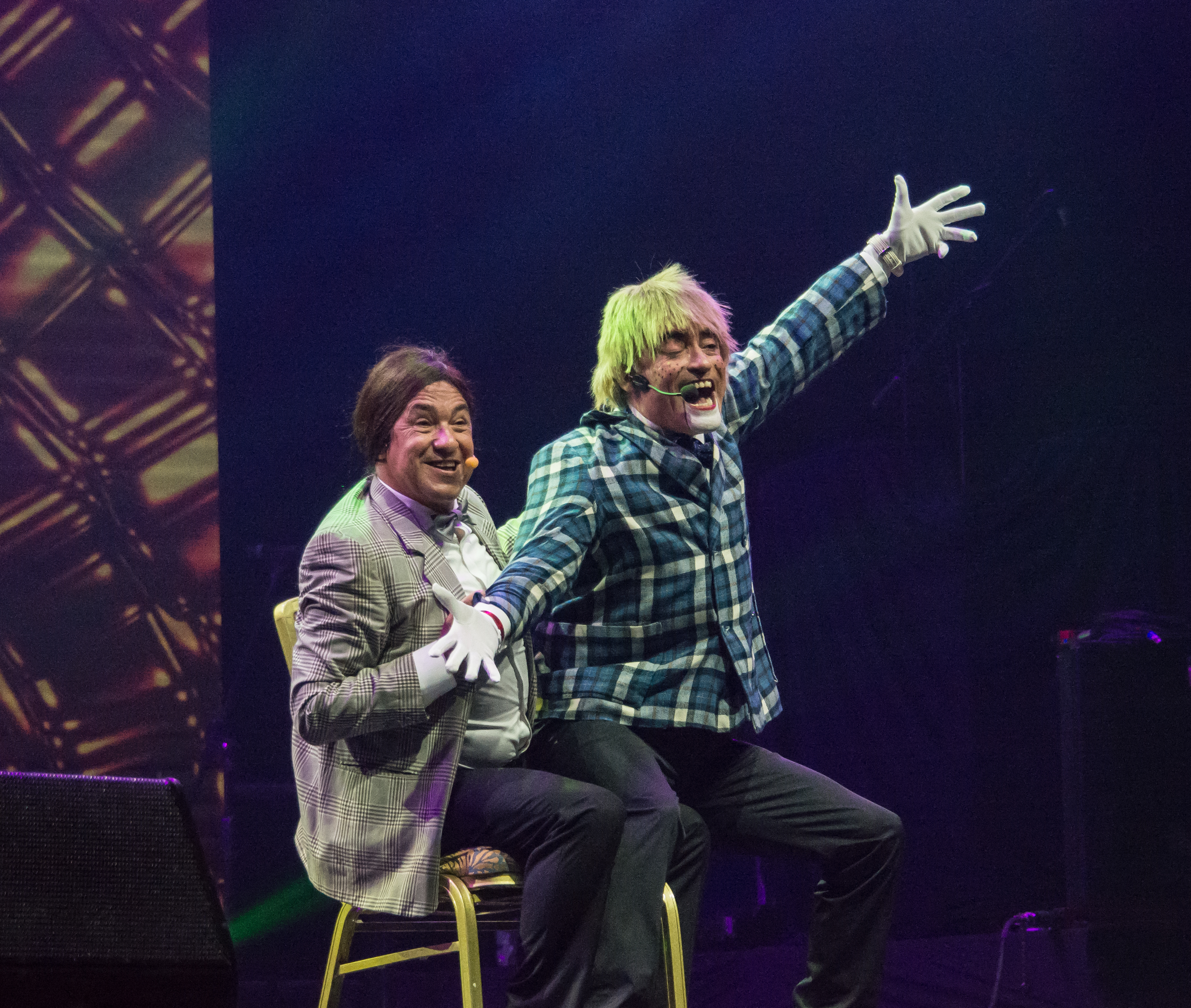 Melón y Melame, Copihue de Oro 2018, Sun Monticello, Mostazal, Región de O'Higgins, Chile